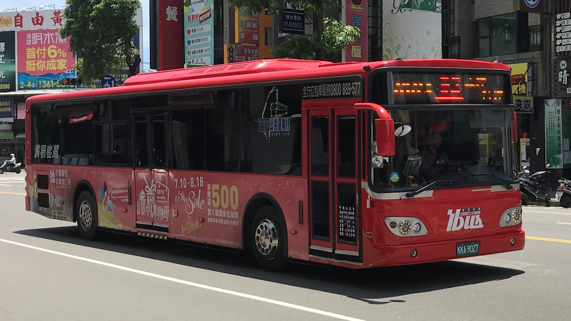 HanCheng KKA-9027